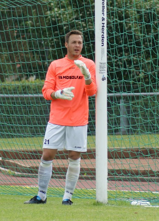 Benjamin Huber bei einem Spiel für den VfL Kirchheim